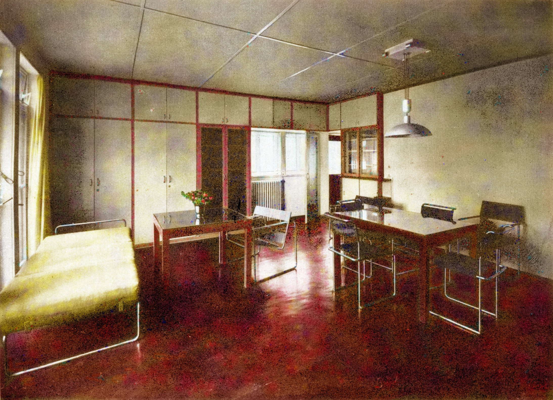 Innenansicht des Gropiushauses in der Weißenhofsiedlung